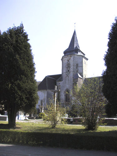 L'église de Alette (dépt. Pas-de-Calais)